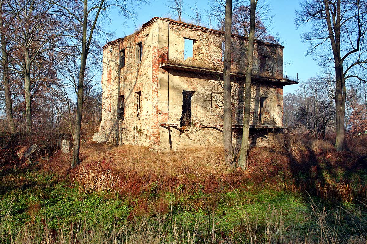 Mirocin Sredni - dwór z XVI wieku.